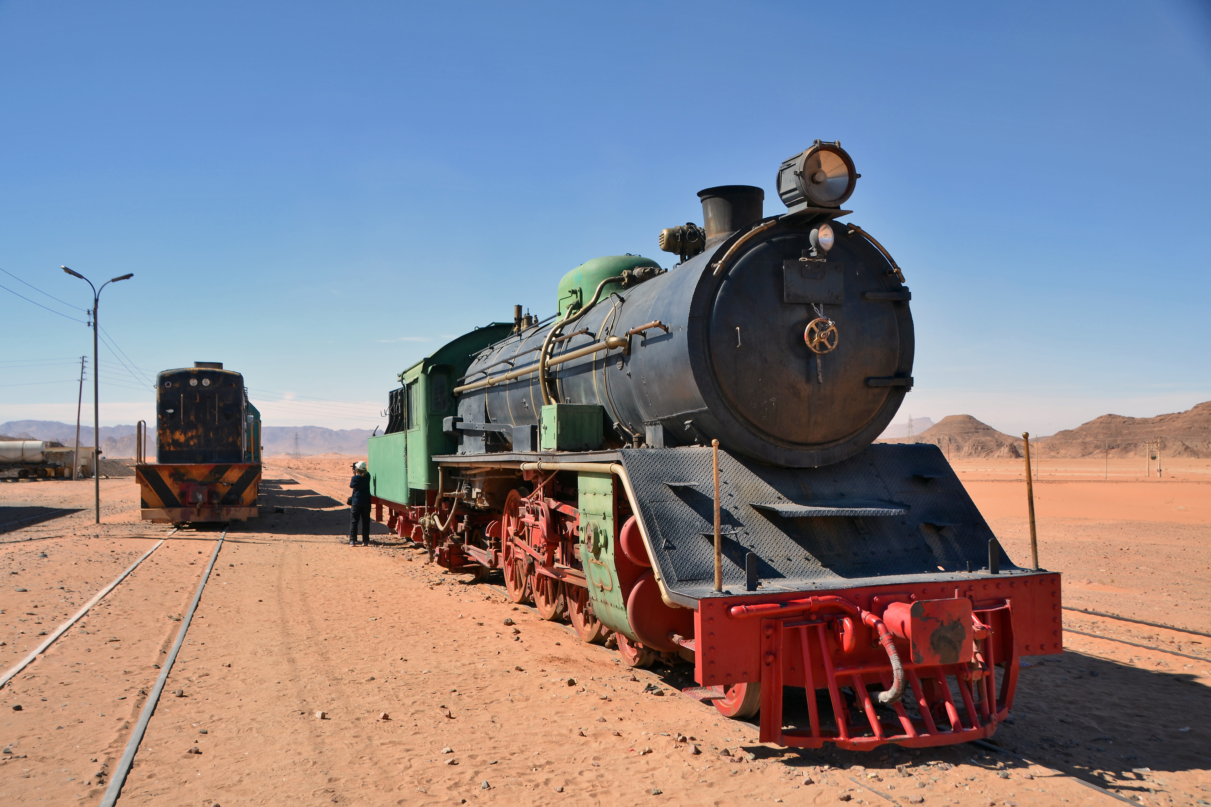 Bahnhof Wadi Rum - 05.03.2020